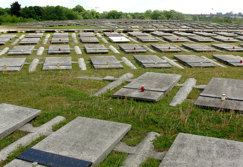 Wrocław, cmentarz żołnierzy polskich(MW)